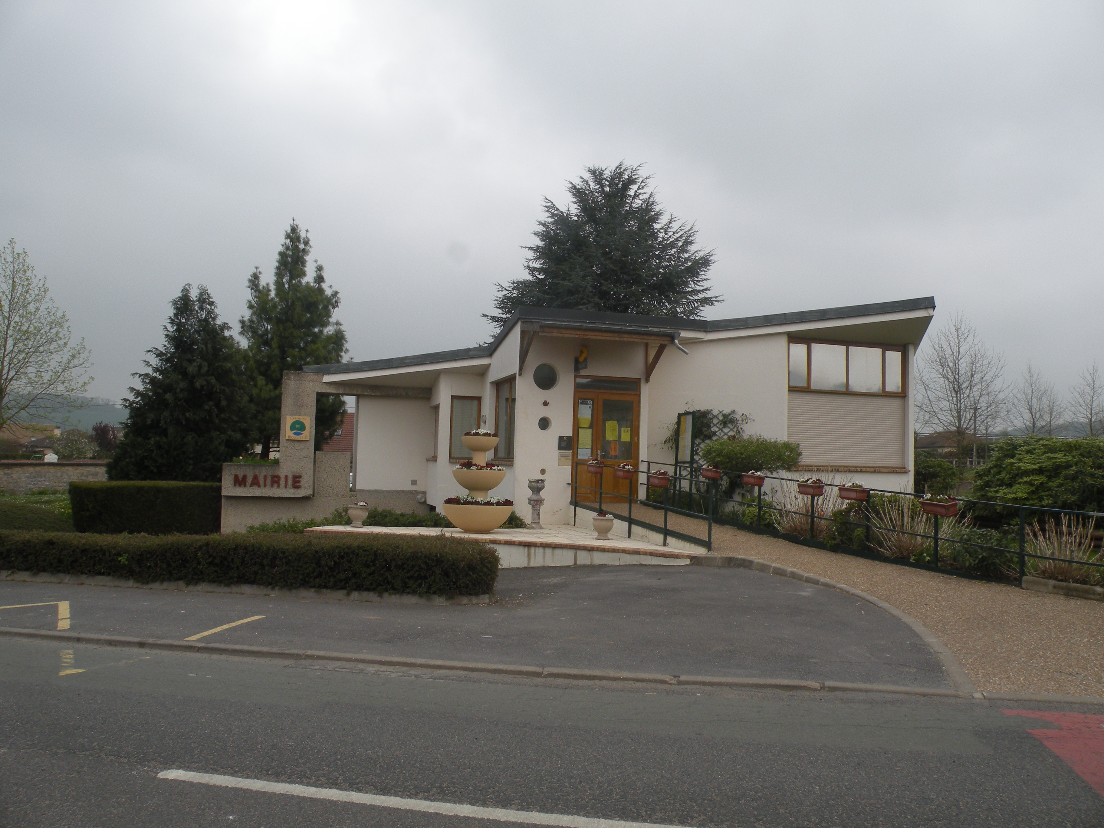 Bray-et-Lû mairie